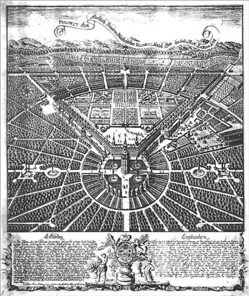 Karlsruher Schloss und Schlossgarten um 1739